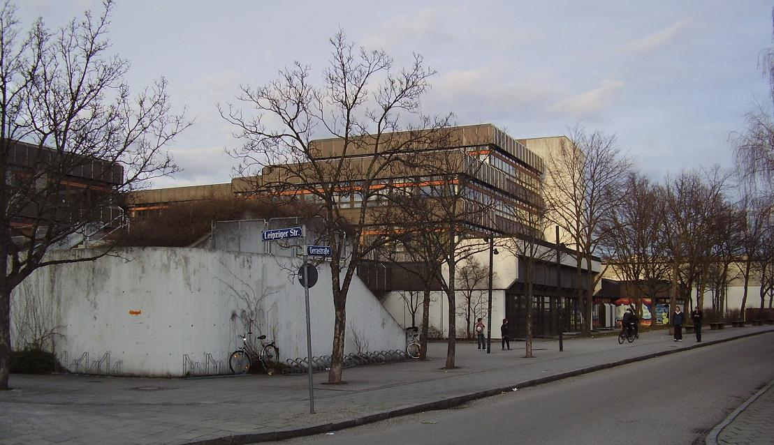 Gymnasium München-Moosach in München (Munich / Germany)